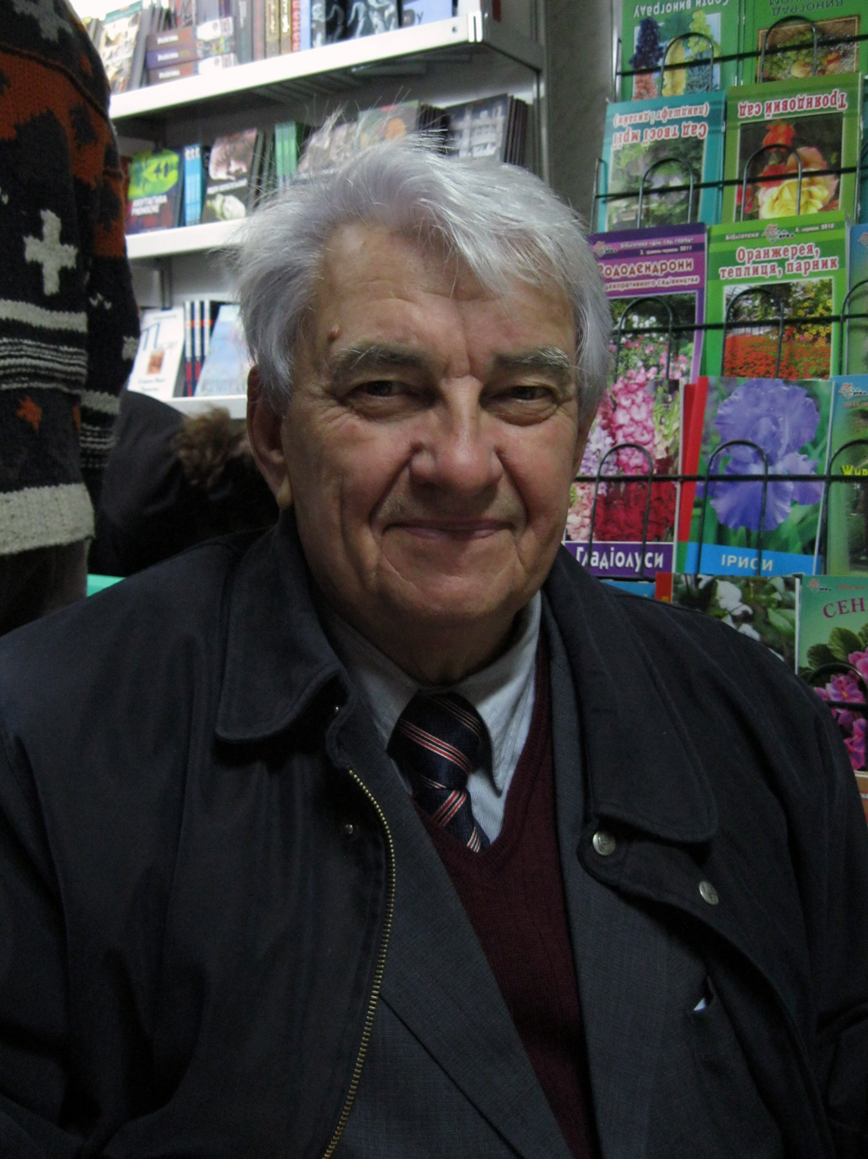 Вадим Крищенко на Чотирнадцятому Київському міжнародному книжковому ярмарку «МЕДВІН»